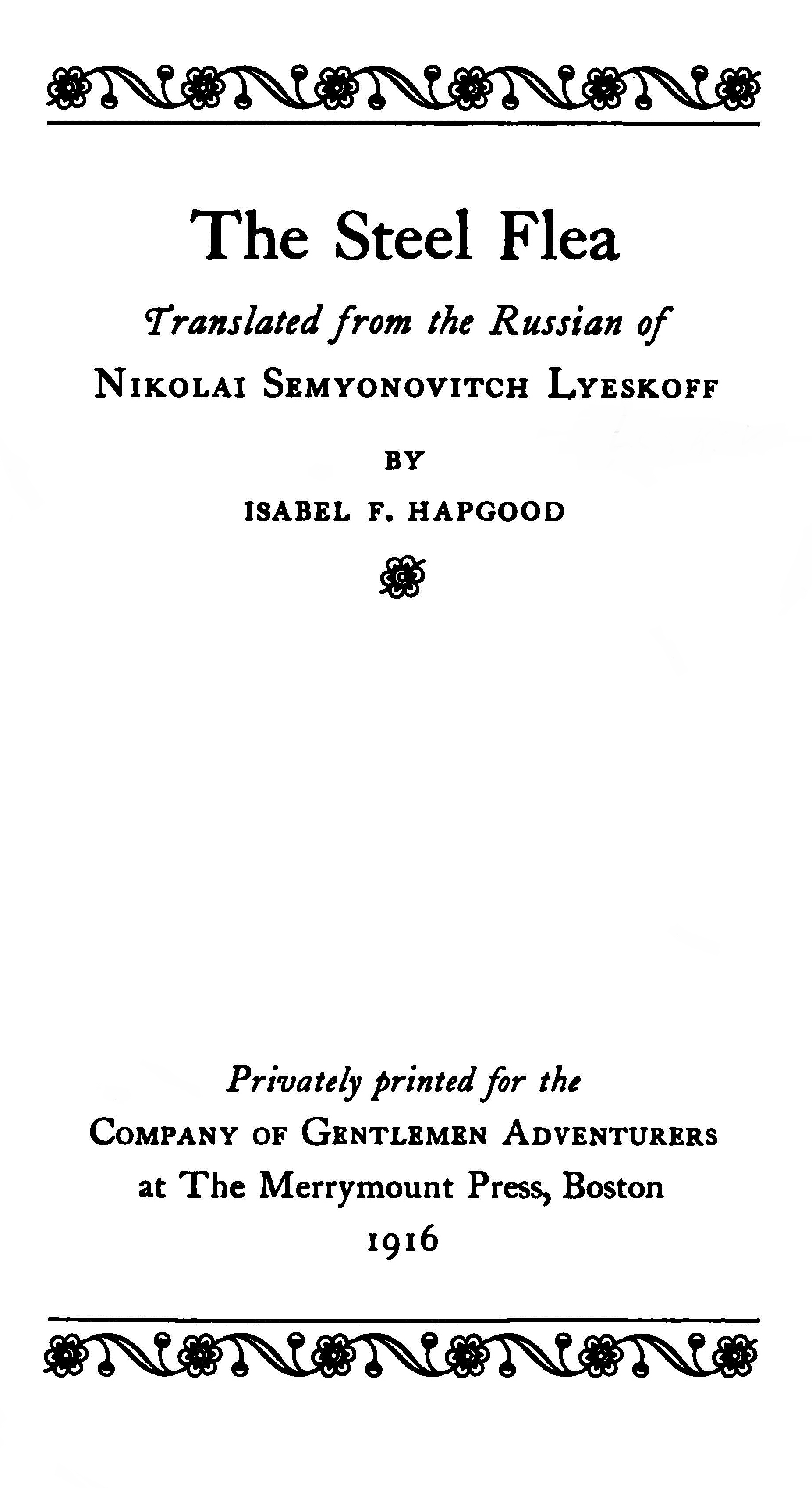 1916 title page